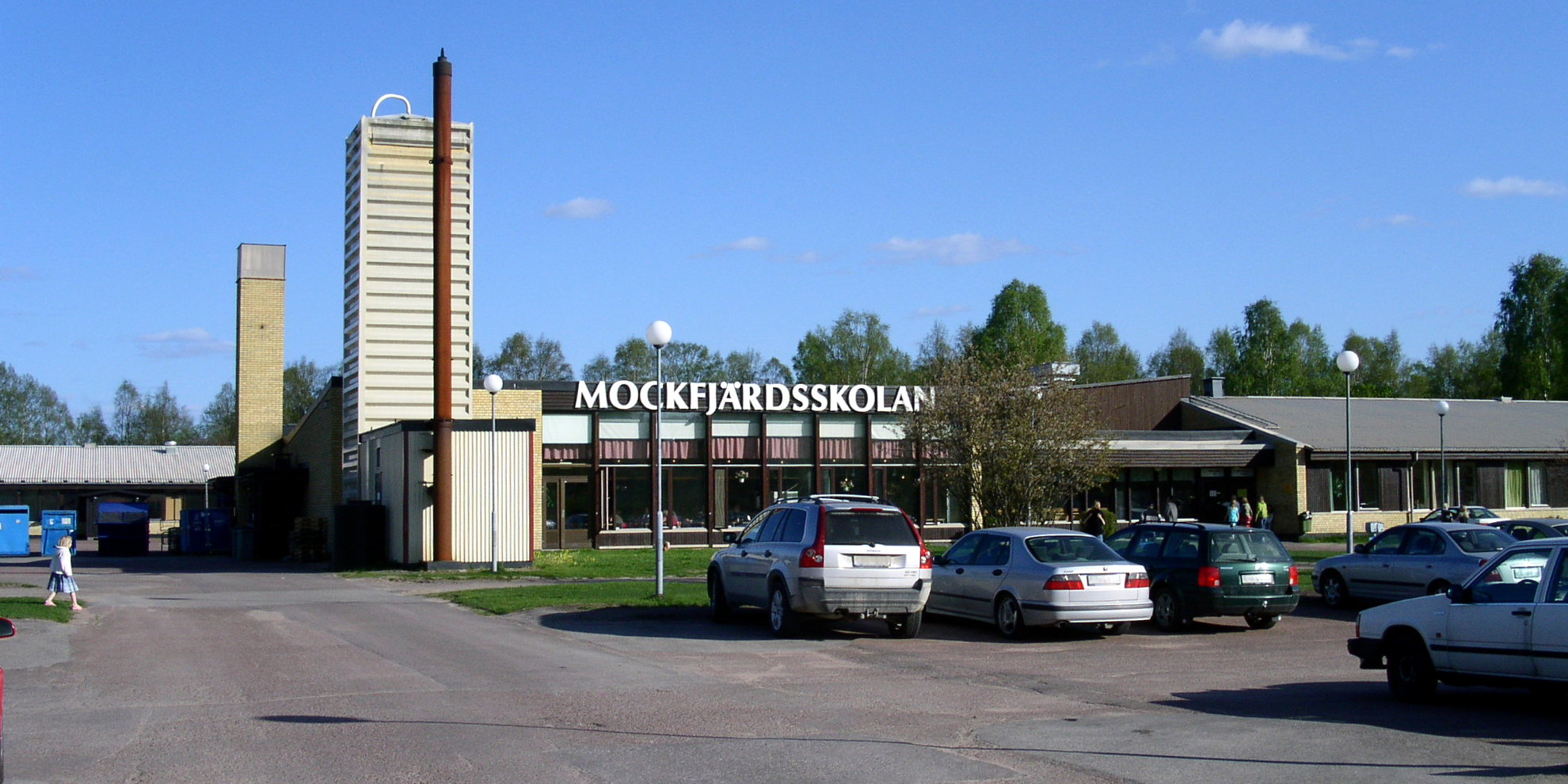 Mockfjärdssskolan (kommunal LMH)